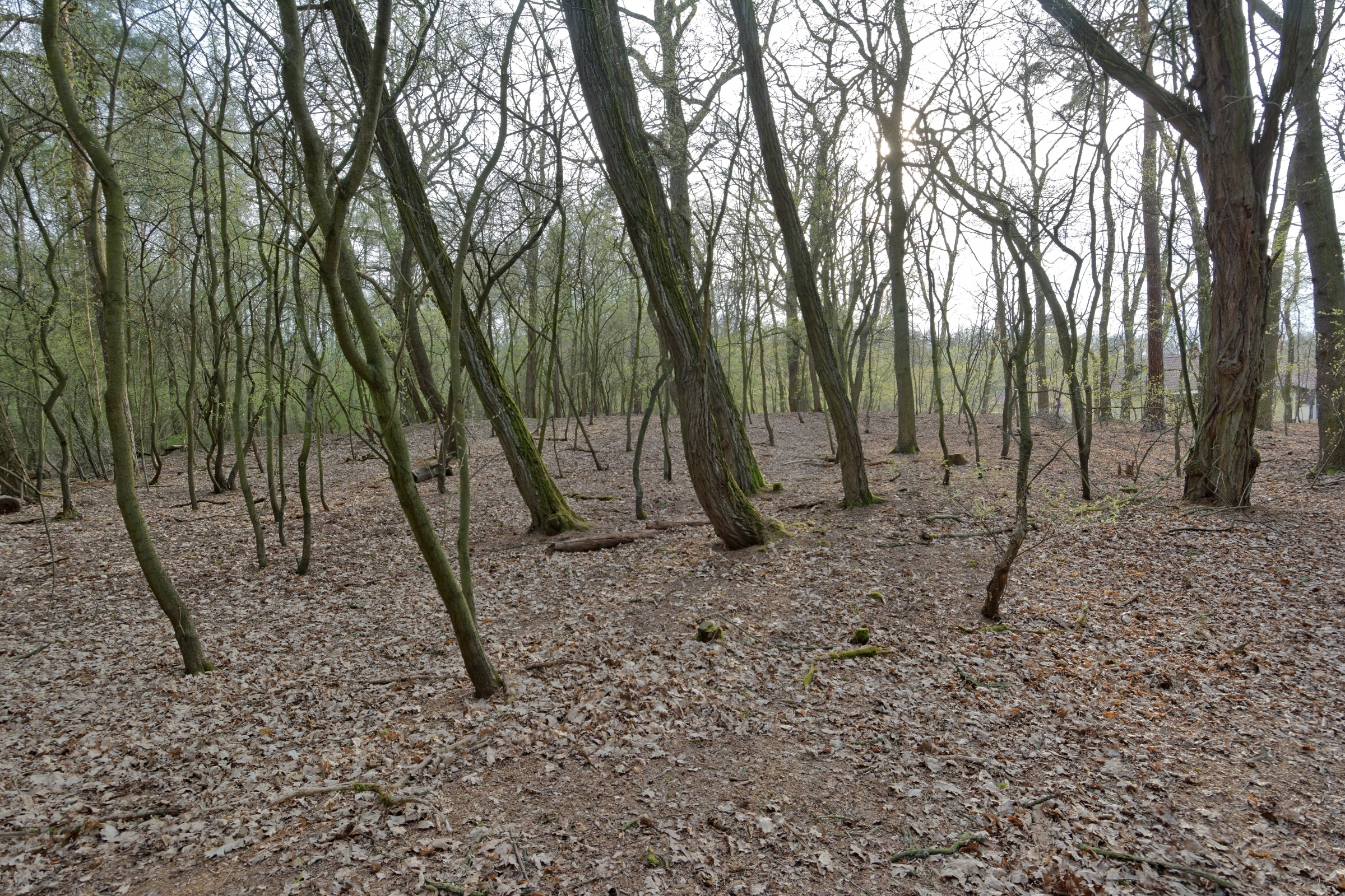 Tvrz Slavětice, Nové Dvory, parc. 1110, Klánovice.